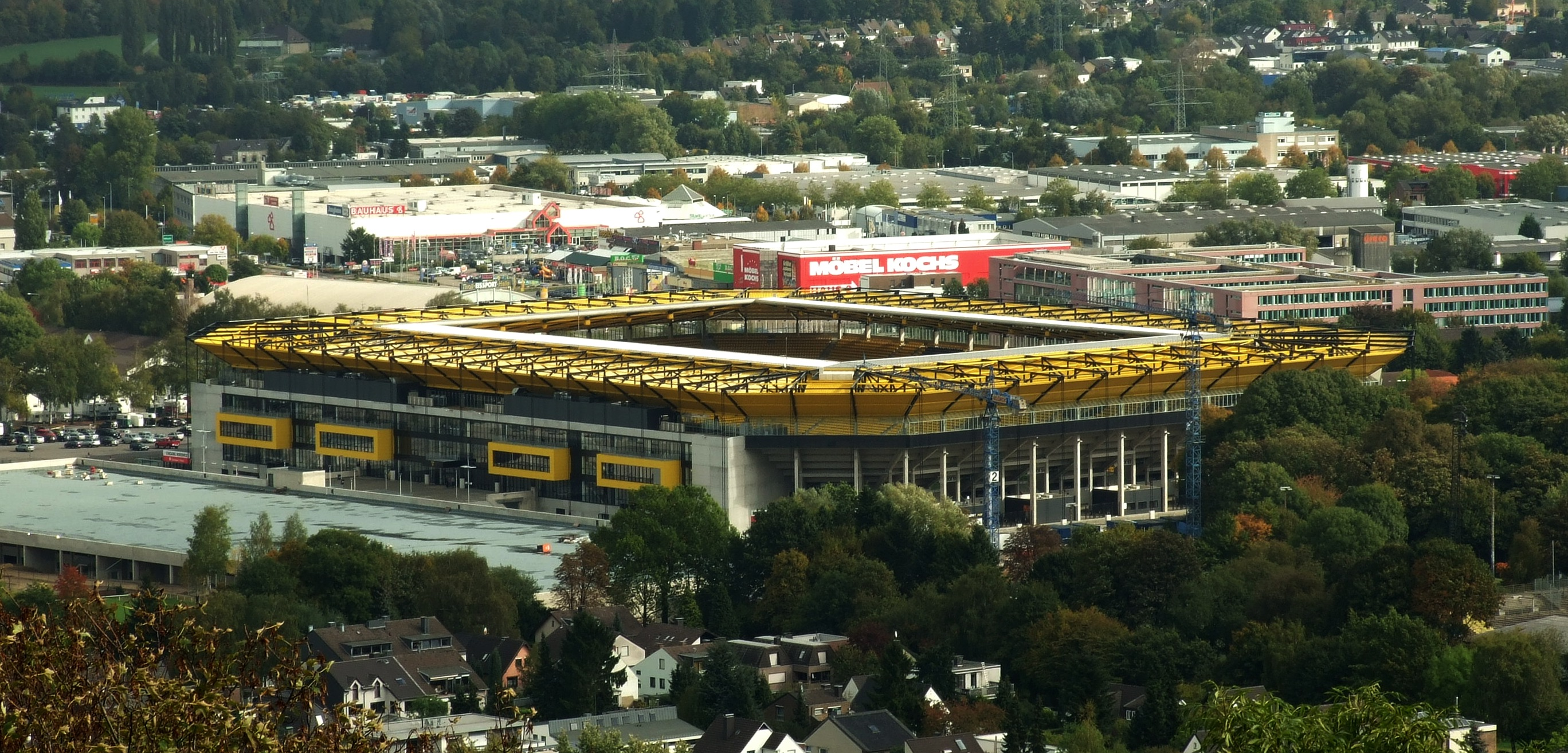 Der Neue Tivoli, Aachen, 2009